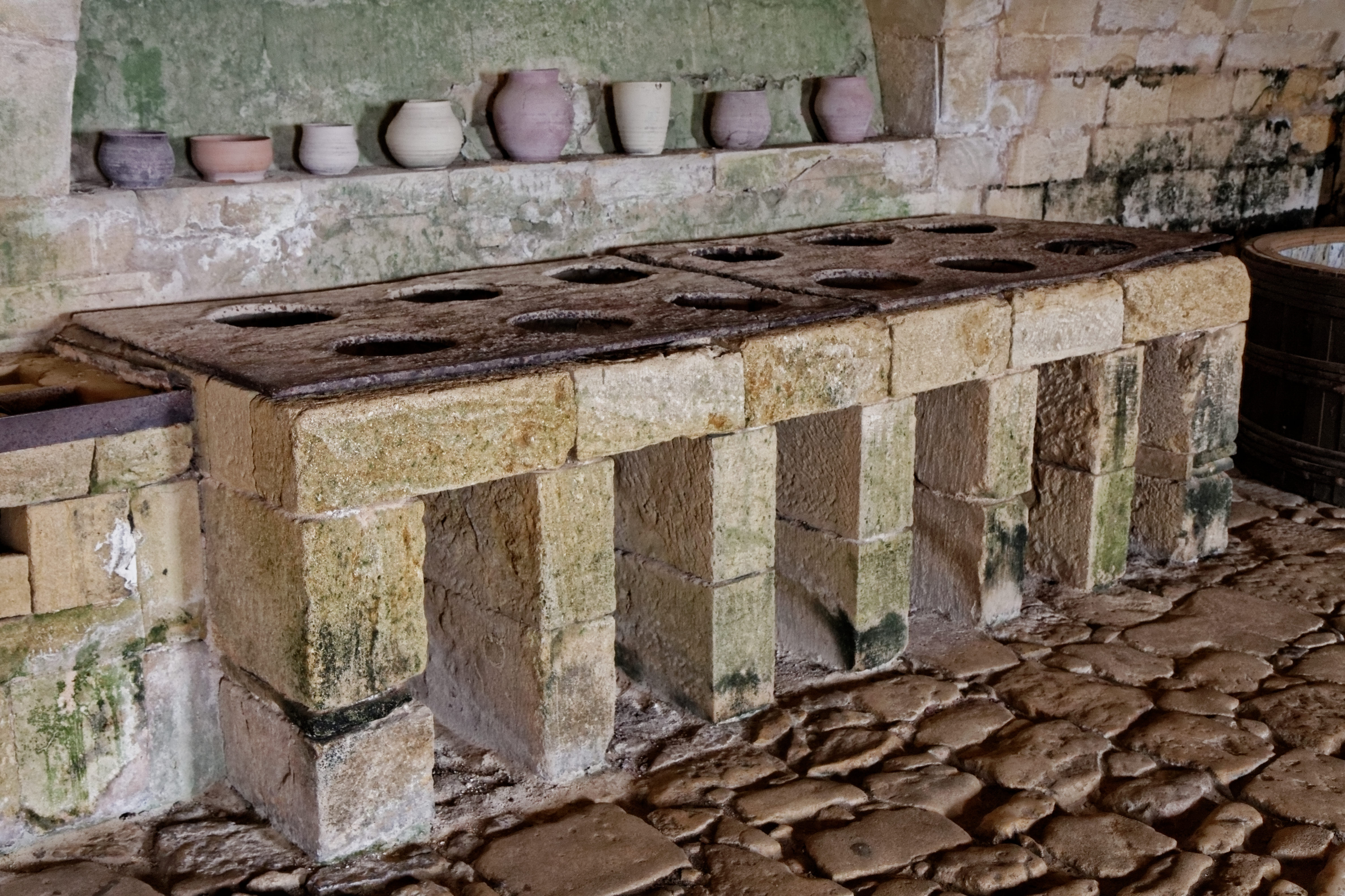 Vue du château de Biron. La grande cuisine du château.